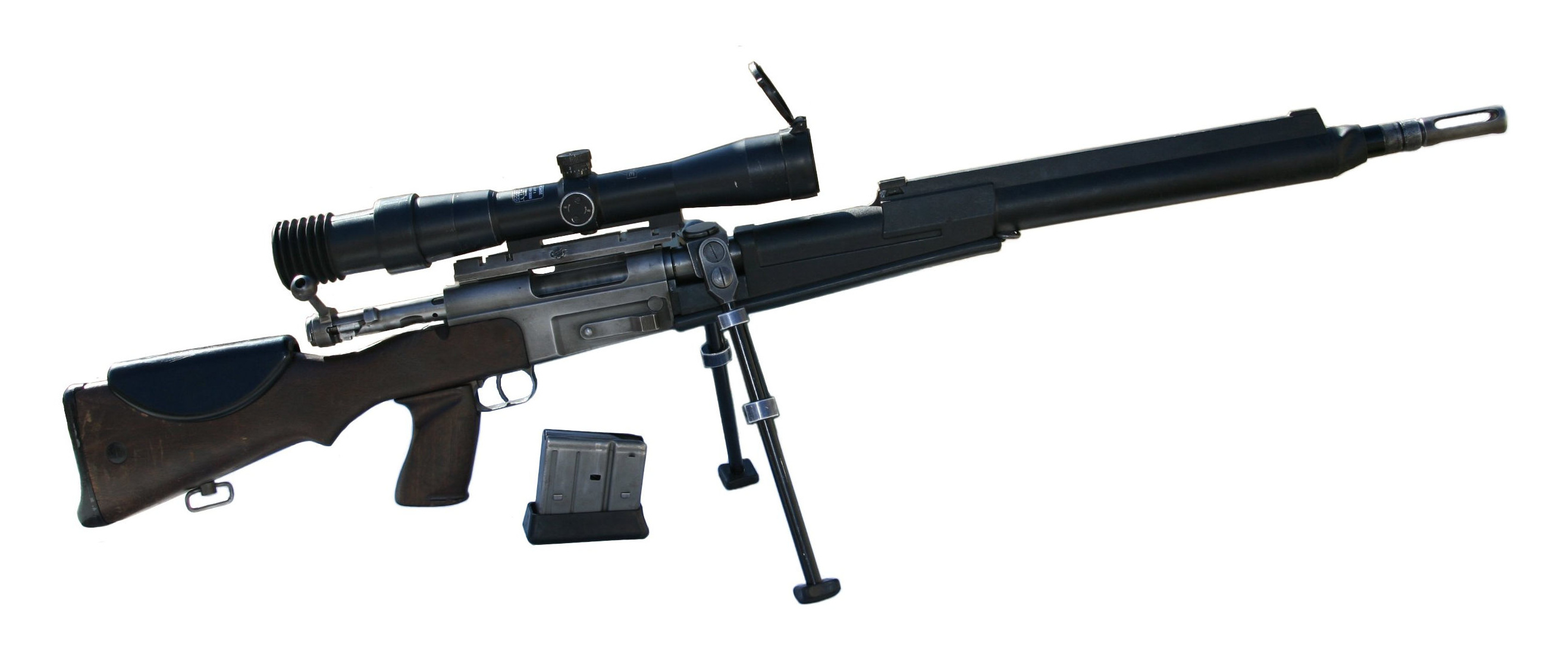 Fusil de précision FR F2 équipé d'une lunette Scrome lors d'une présentation